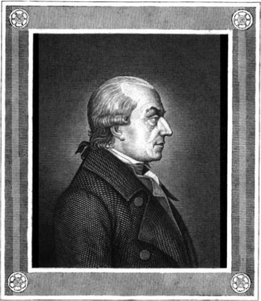 Gottlieb_Konrad_Pfeffel (1736-1809). In: Poetische Werke. 10. Band